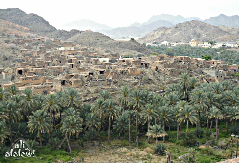 حارة بلدة الوقبة بشمال ولاية ينقل سلطنة عمان